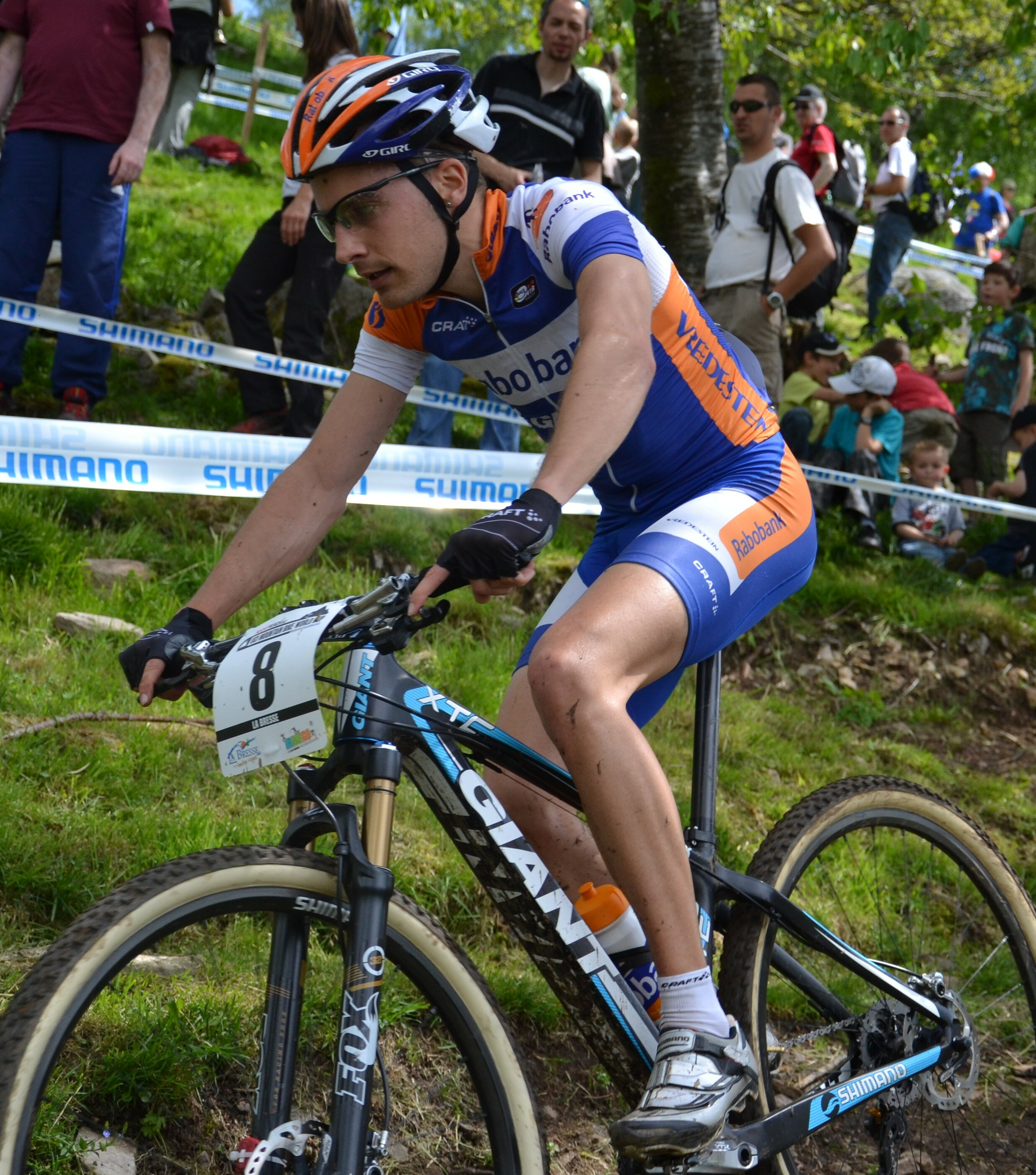 Fabian Giger lors de la 4e manche de la coupe du monde de VTT 2012 à La Bresse (FRA).